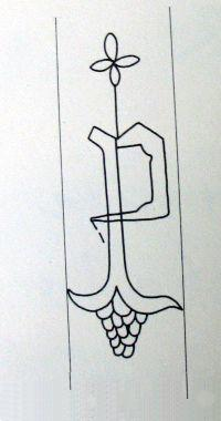 Znak wodny A z De revolutionibus Mikołaja Kopernika